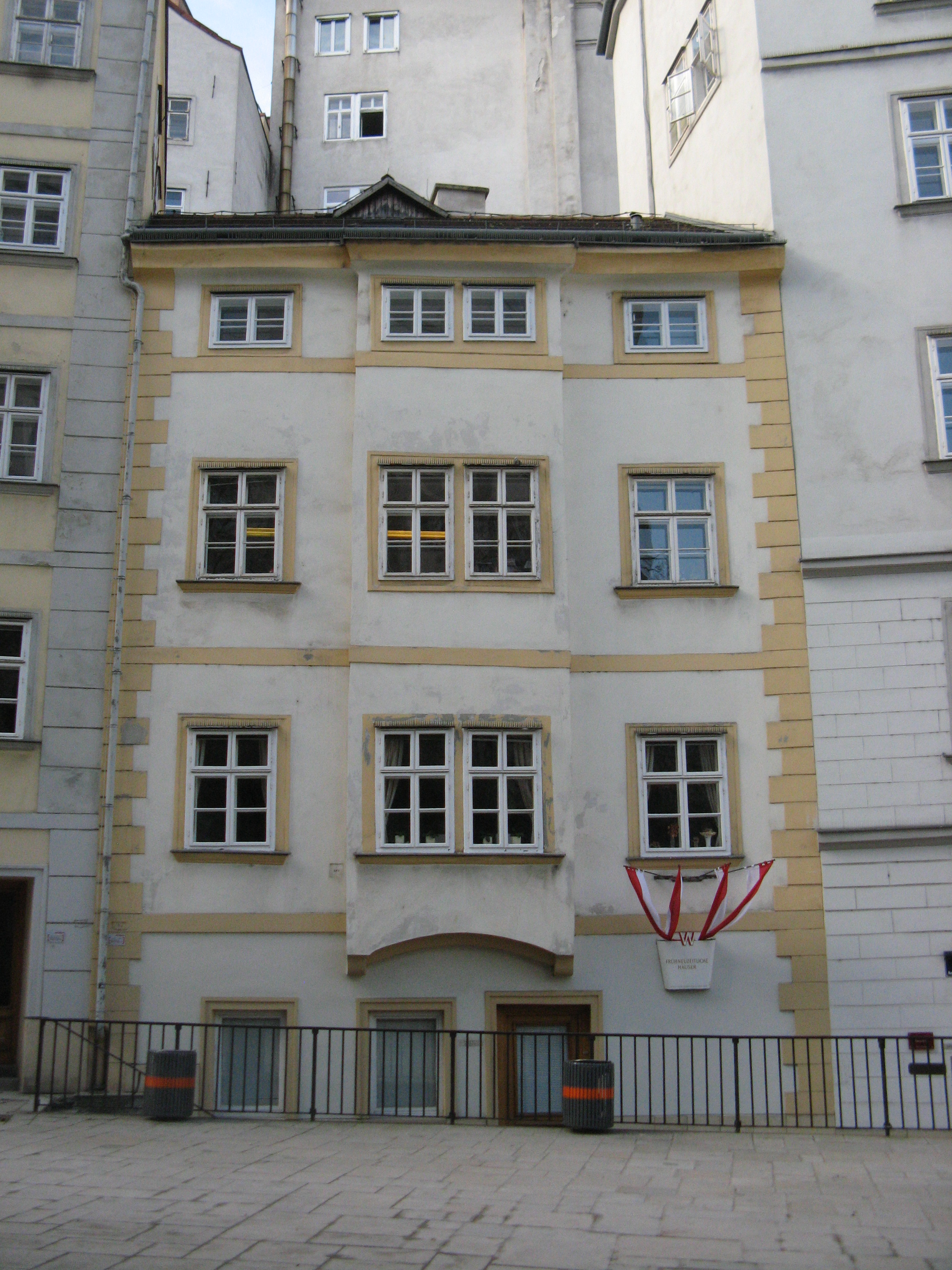 Bürgerhaus (1. Hälfte 16. Jahrhundert), Am Gestade 5, Wien-Innere Stadt